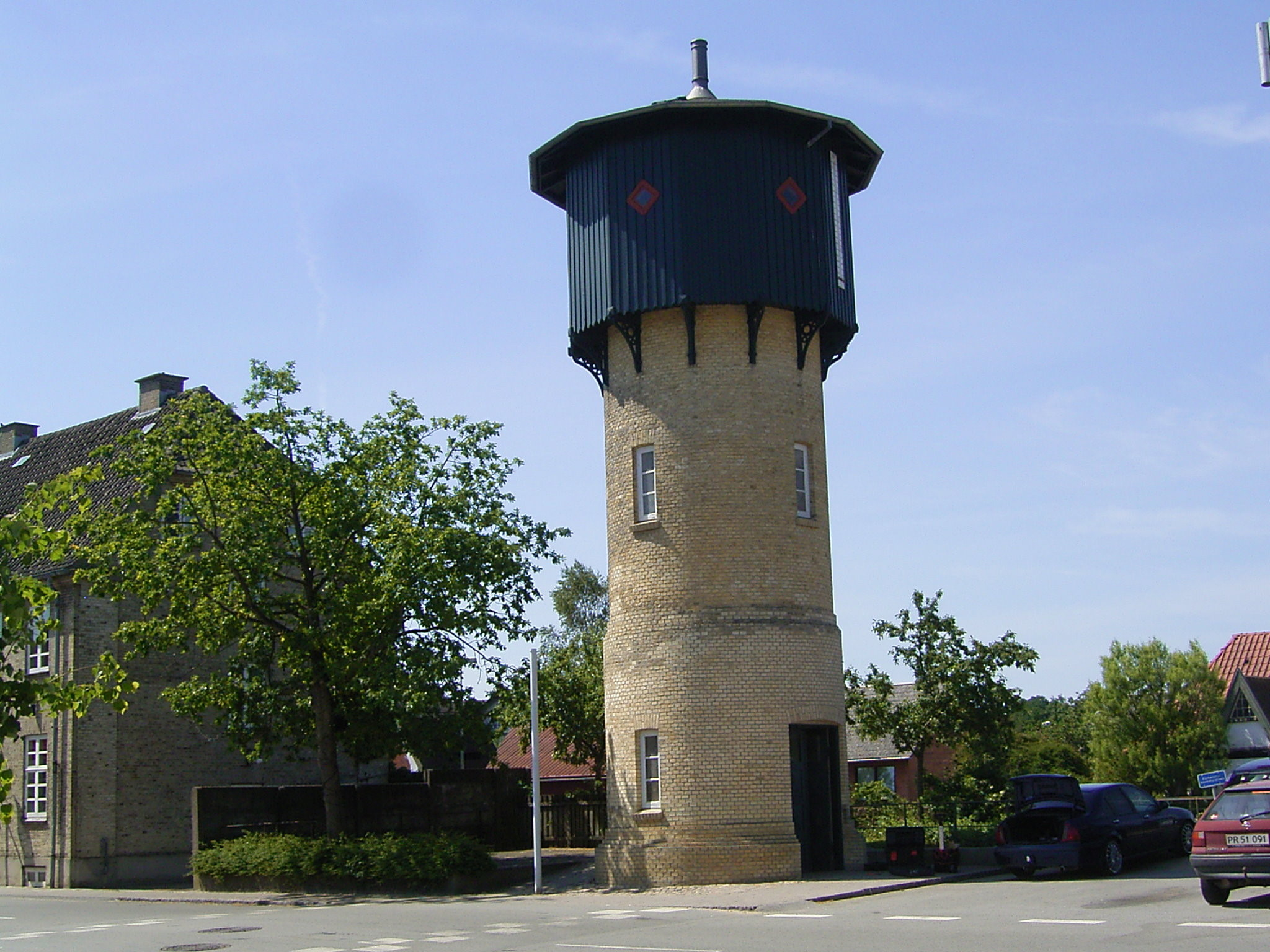 9520 Skørping in Denmark: Sverriggårdsvej